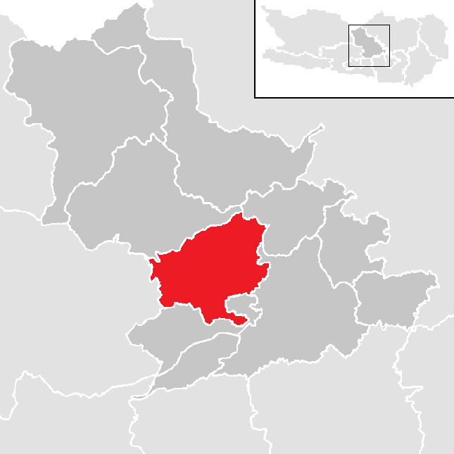 Bezirk Feldkirchen